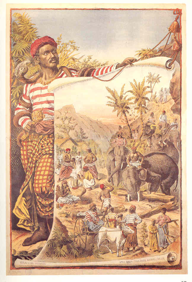 Plakat ür eine Singhalesen-Völkerschau bei Carl Hagenbeck Farblithographie